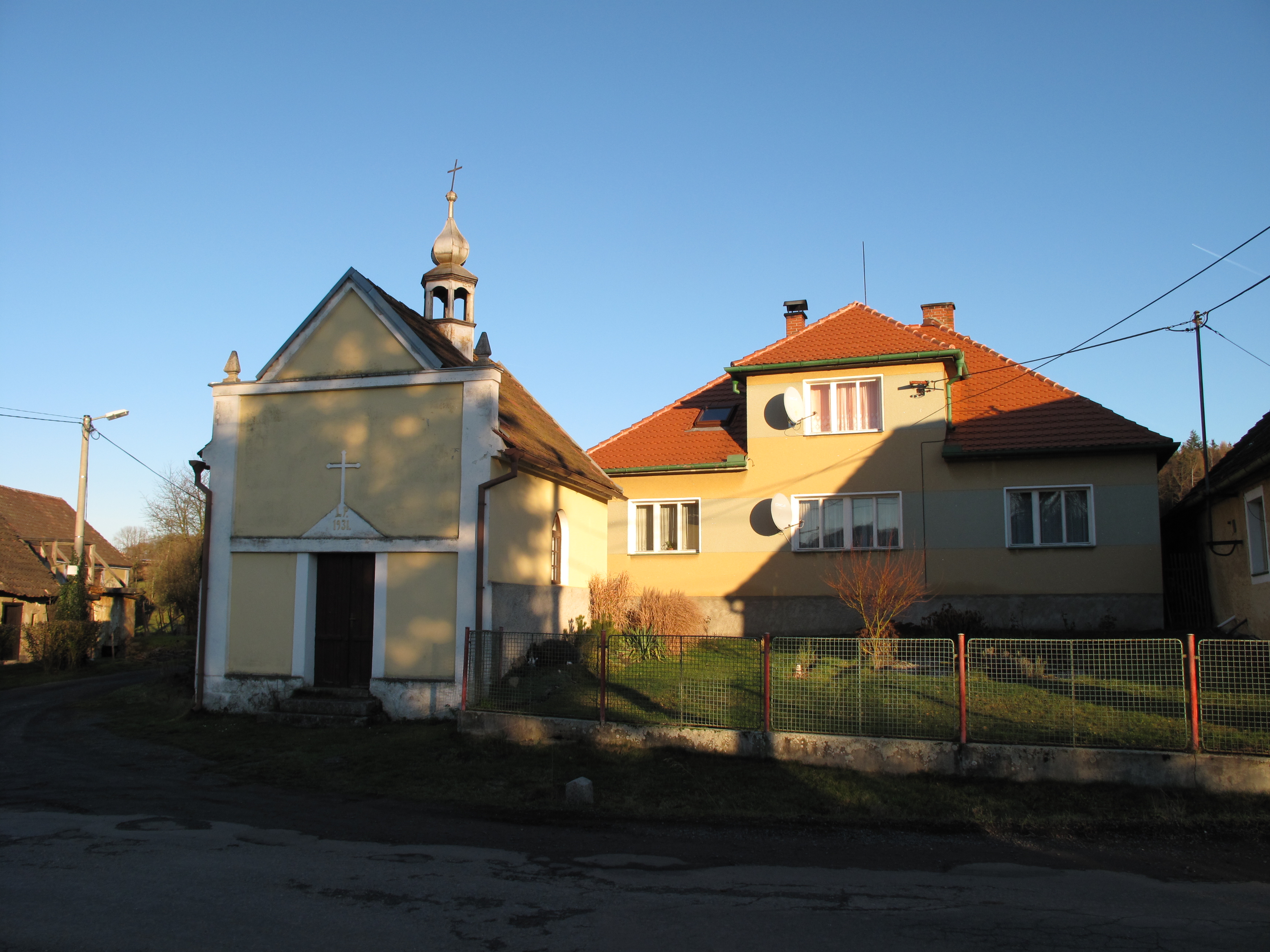 Kaplička v Újezdci. Okres Plzeň-jih, Česká republika.